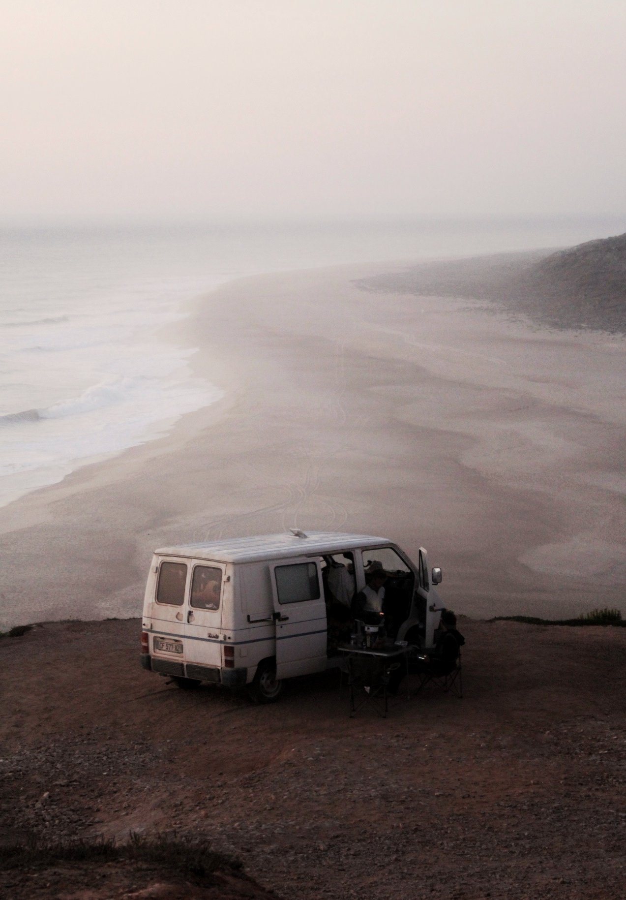 Praia do Norte (North Beach) in Nazaré, Portugal